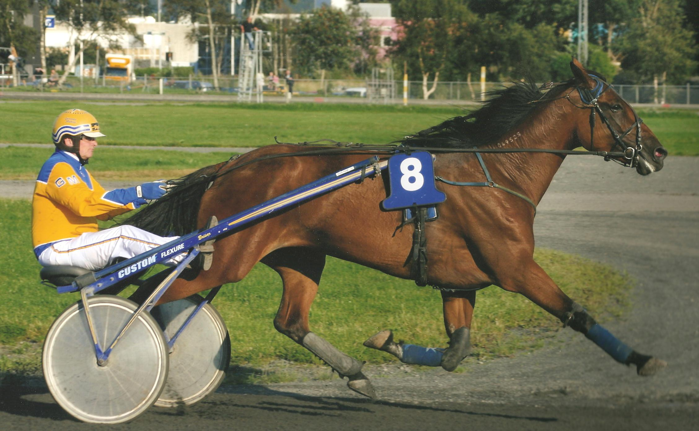 Gunnar Mehla med Ågårds Eva